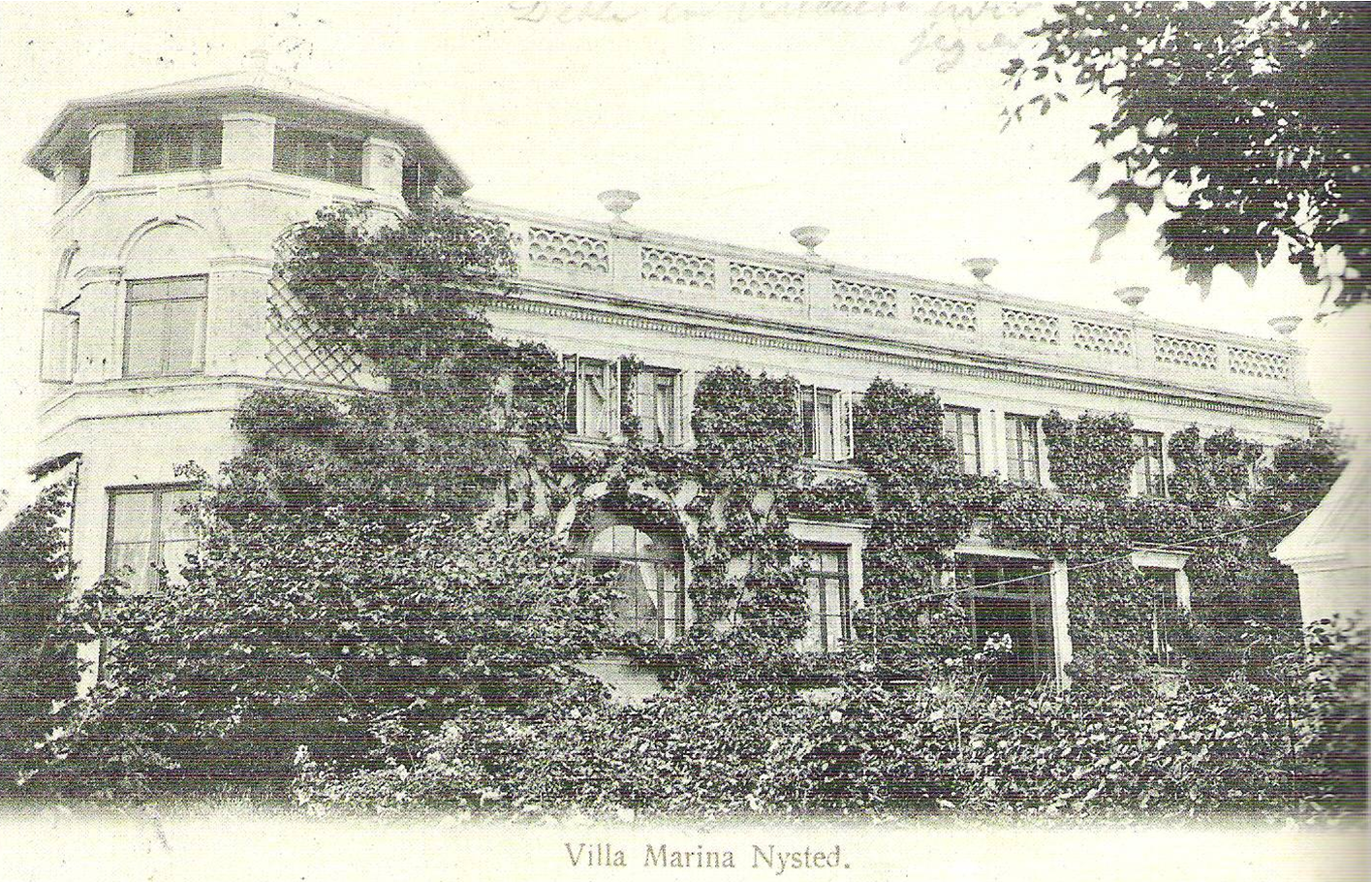 Hus i Nysted, opført 1878 - billedet stammer fra et postkort fra omkring 1920 beroende i Nysted Lokalarkiv